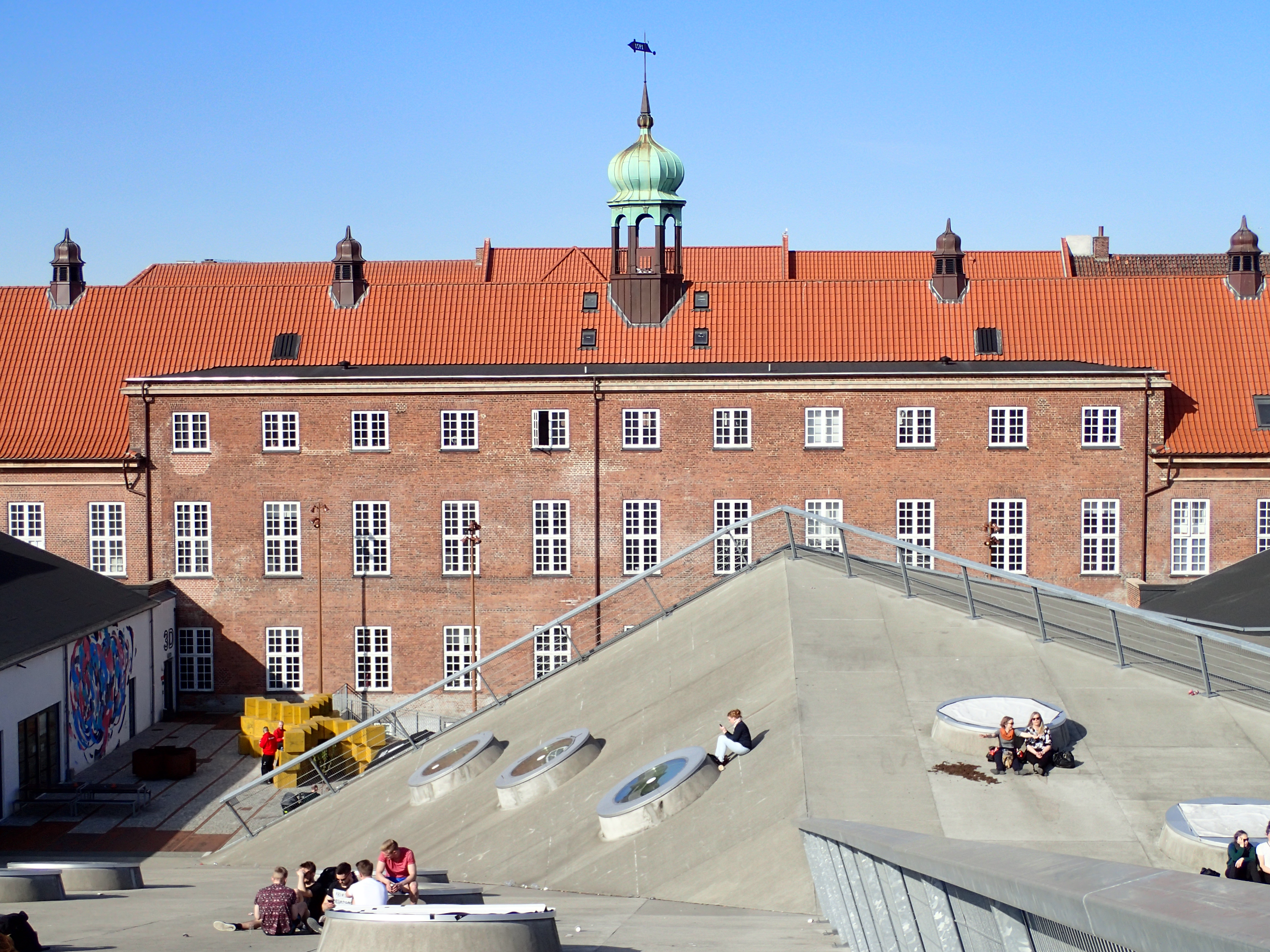 Århus Godsbanegård, hovedbygningen.